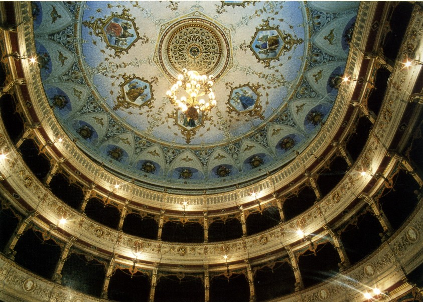 Cagli, Teatro Comunale Parametri [modifica]